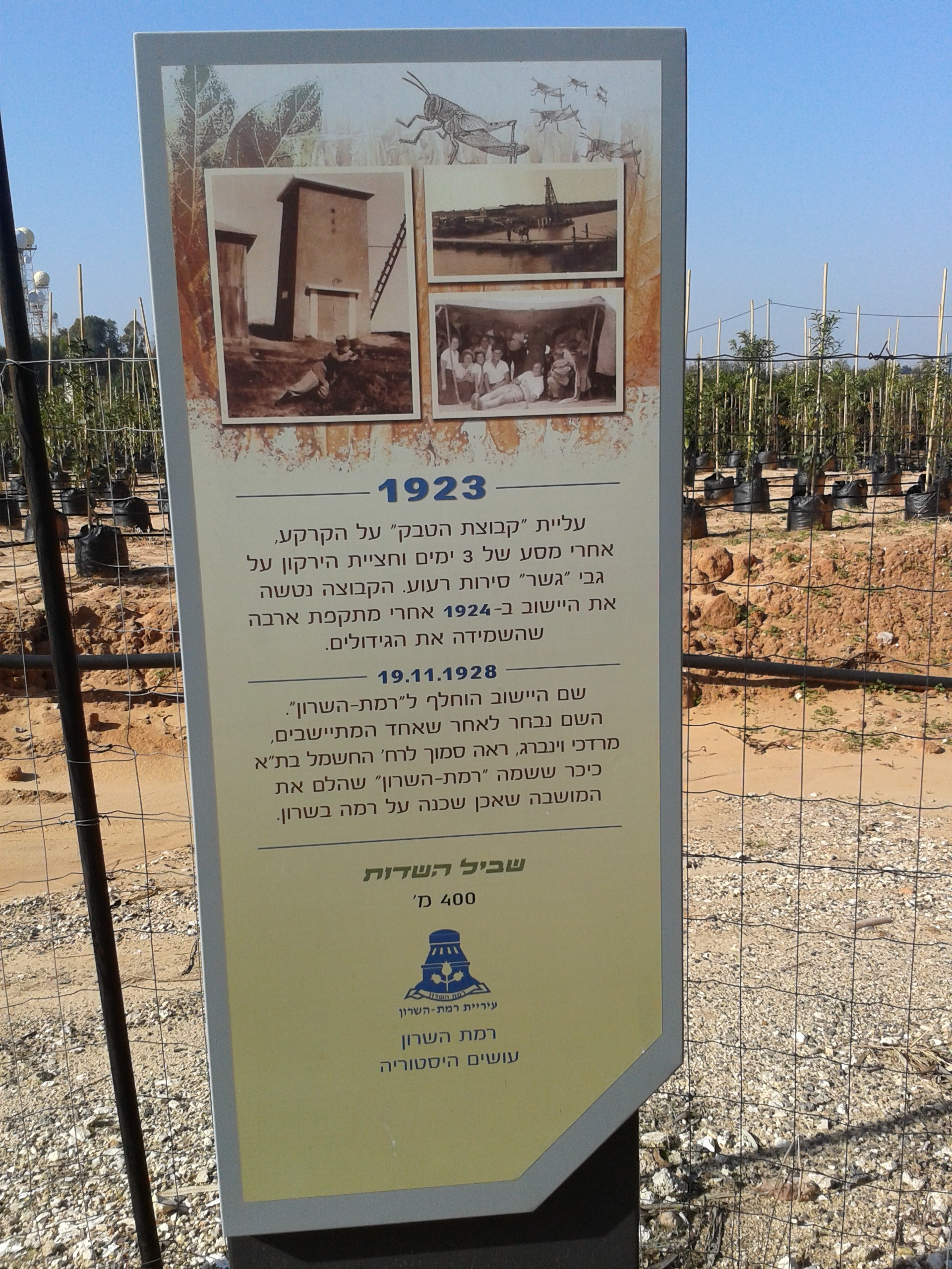 רמת השרון - שביל השדות